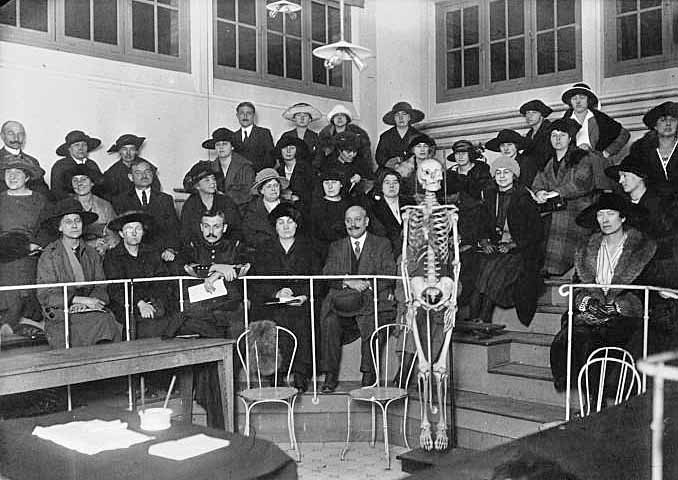 "Hopital Necker : vue d'une salle pendant le cours du Professeur Brocca" [photographie de presse]